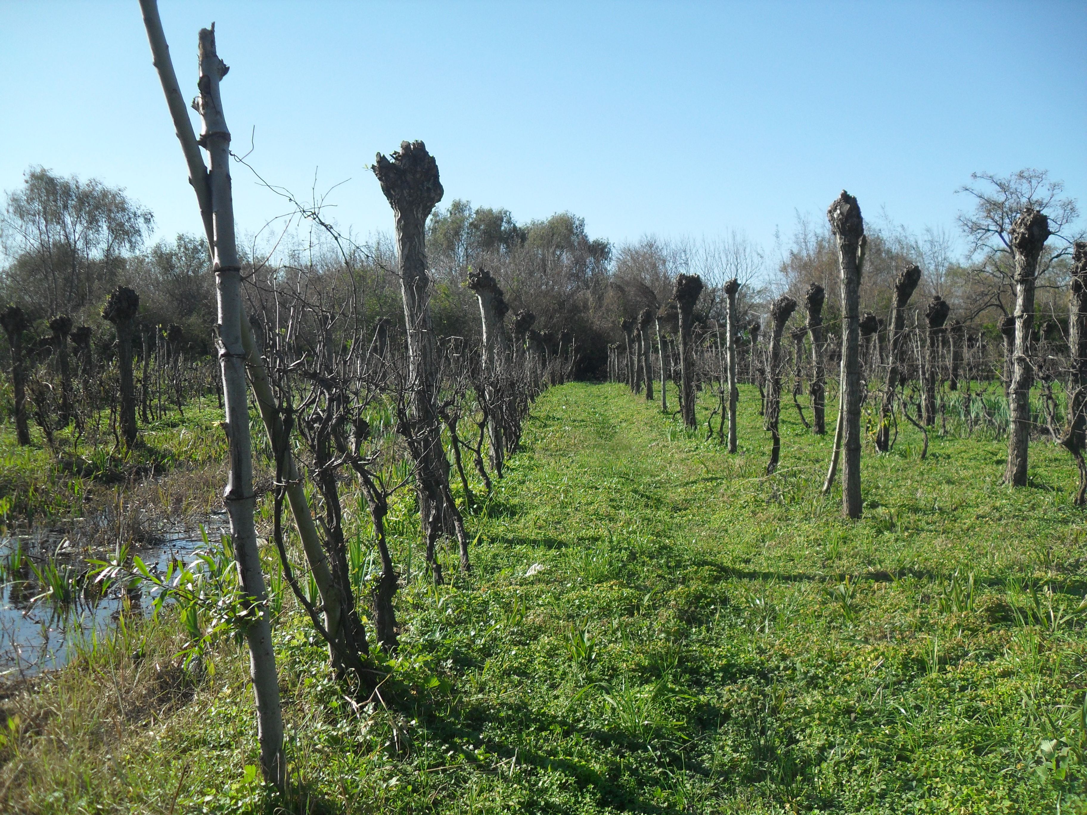 Rosalía Del Carmen Ledesma, 45 años, UTN FRA, VILLA DOMINICO